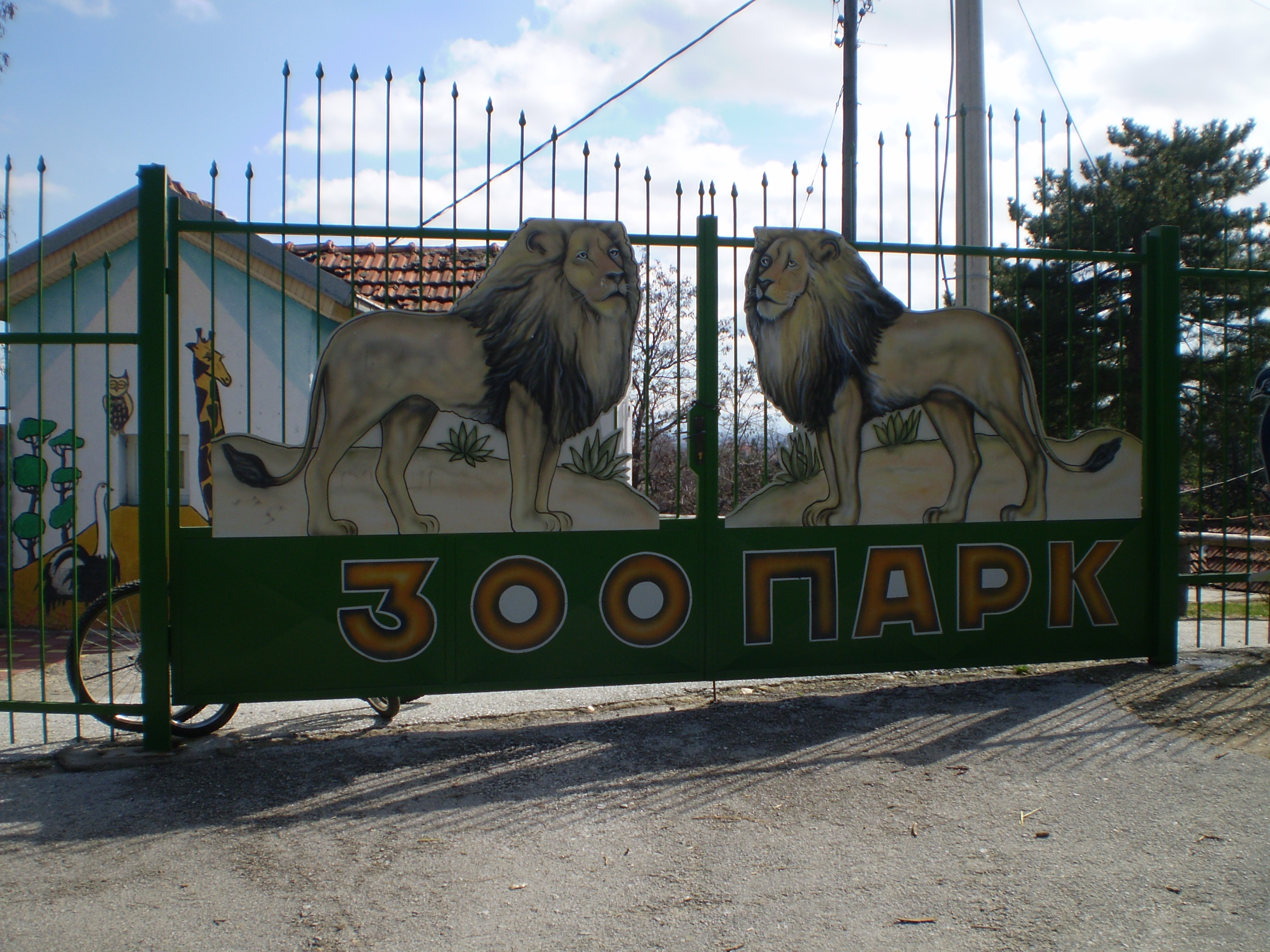 = Лиценца: ==